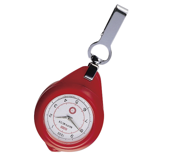 1965年、日本初の“歩数計”万歩計１号機「万歩メーター」が発売。 アナログ機械式で１目盛100歩。価格は2,200円。(当時の大学卒の初任給が2～3万円の時代なので決して安いものではなかった) 当時の運動不足の解消にウォーキングが見直され、「1日1万歩」運動などを推奨する団体が積極的に活動を進めるなど社会全体の流れにのってヒット商品となった。